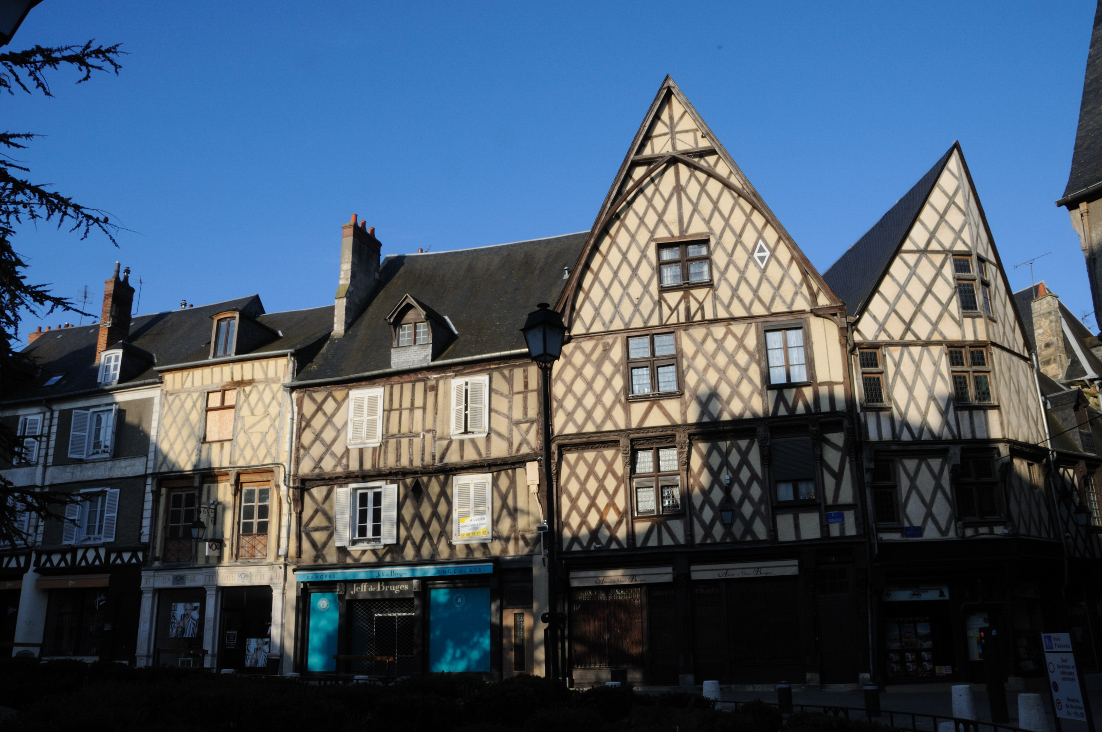 Place Gordaine, Bourges, Cher, France